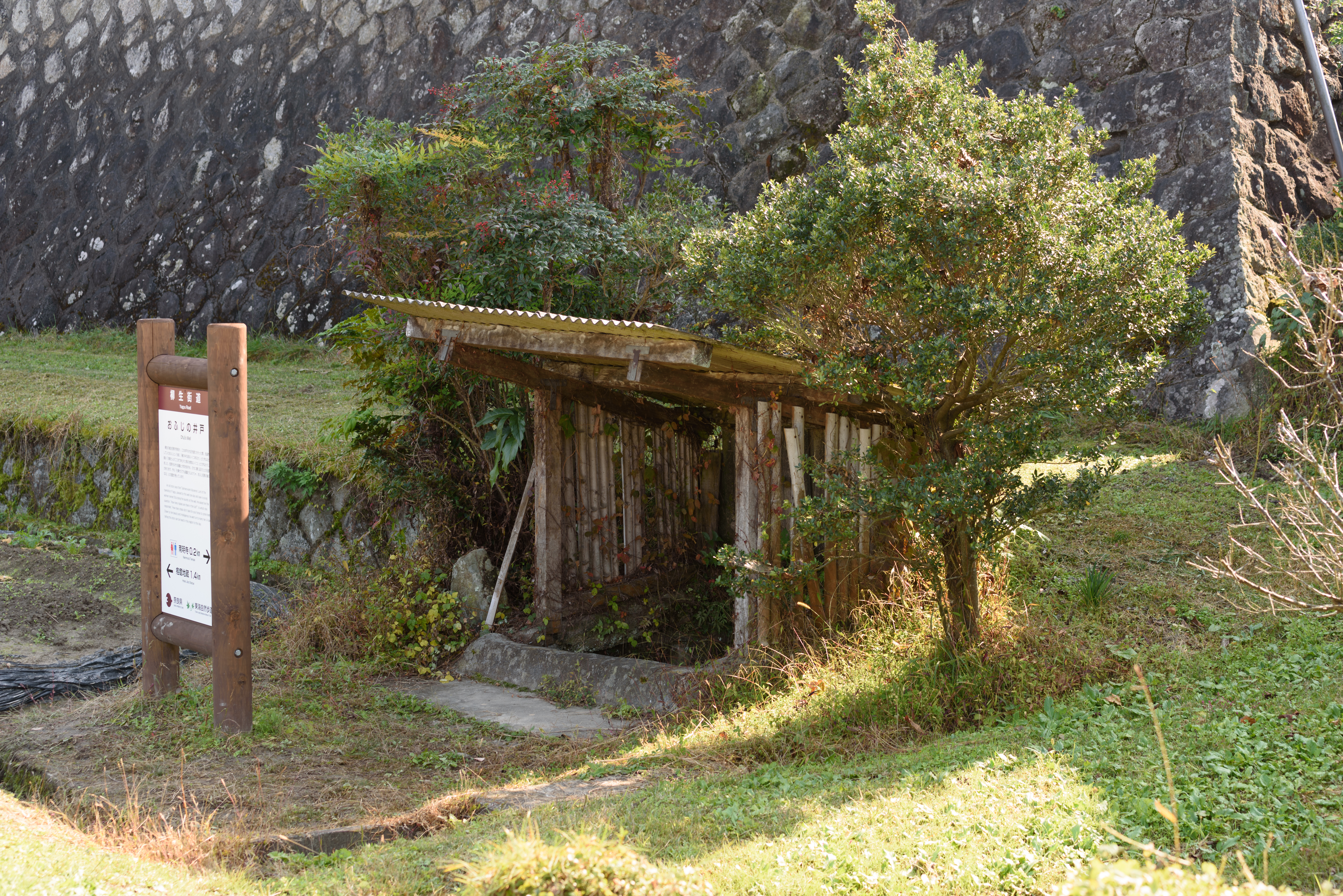 柳生街道沿いにある「おふじの井戸」（奈良県奈良市阪原町）。柳生宗矩との故事が伝わる。